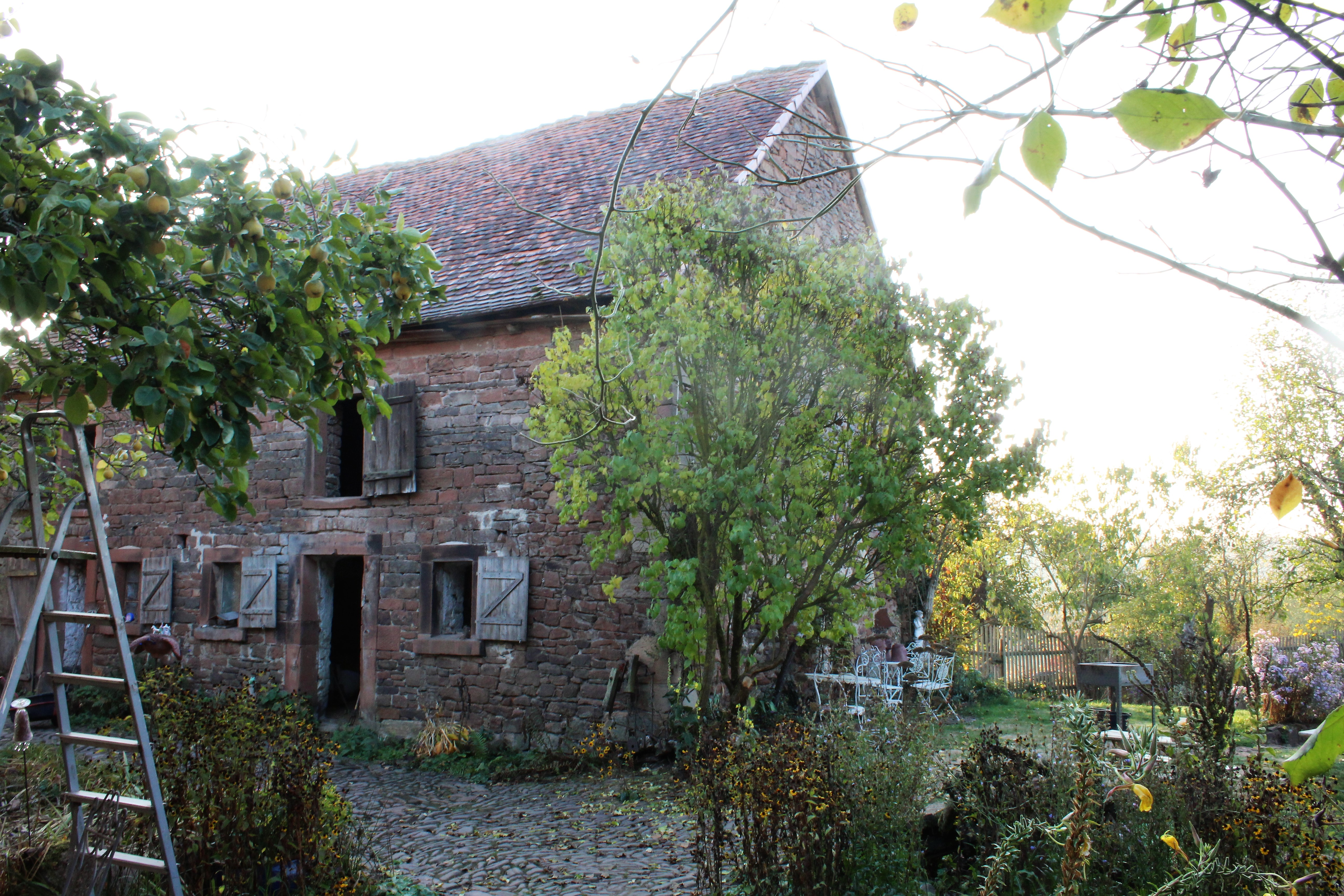 Ehemalige "Hainskirche" Cyriaxweimar, Marburg, Landkreis Marburg-Biedenkopf, Hessen, Deutschland